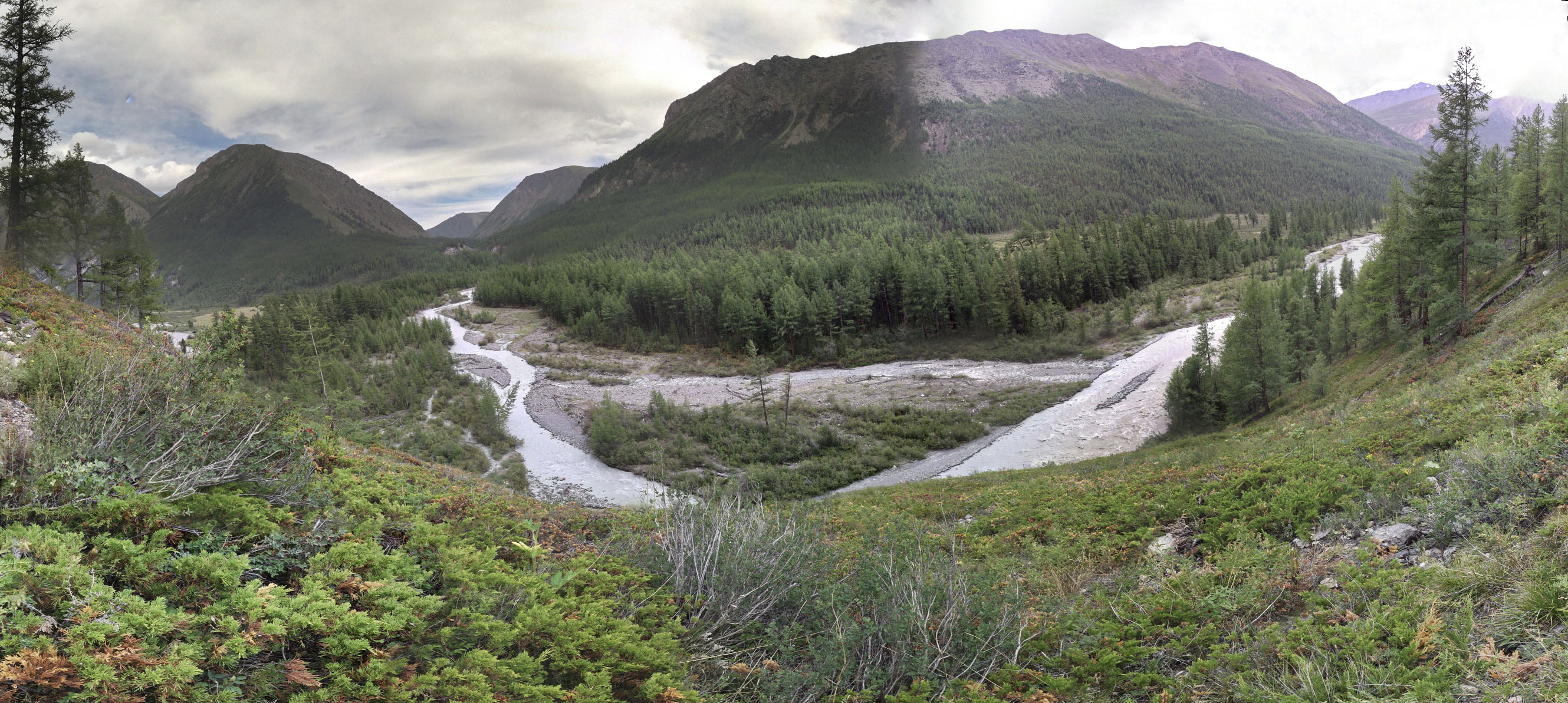 Впадение реки Йолдоайры (в центре) в Карагем